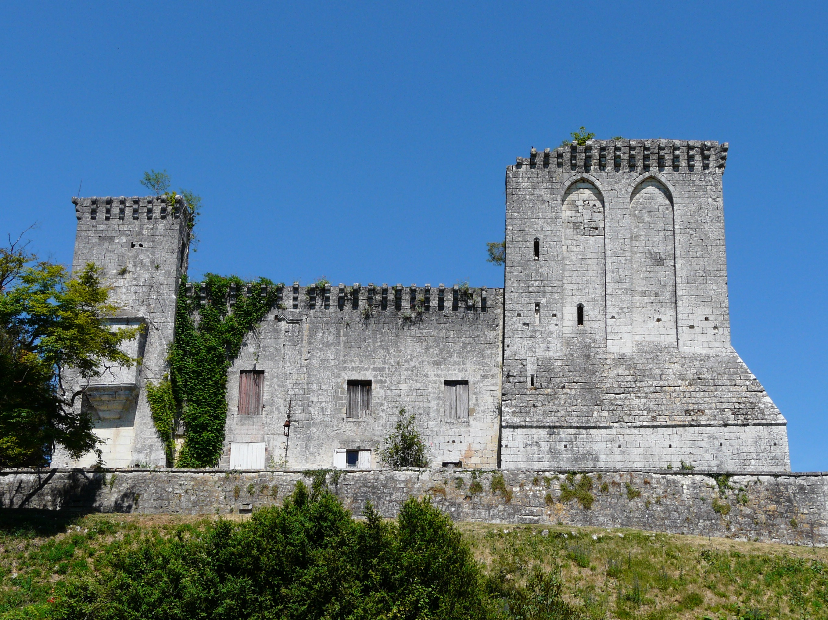 La façade sud-ouest du château de la Tour-Blanche, Dordogne, France.